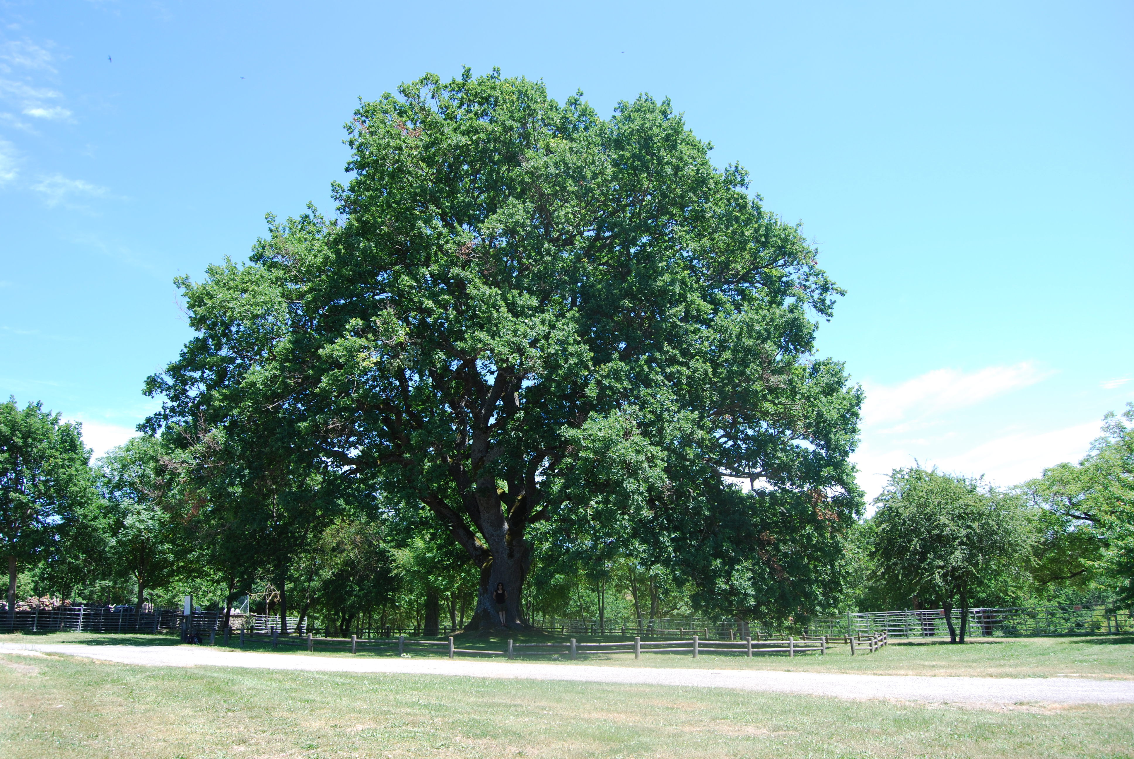 Ondategiko (Zigoitia, Araba) haritza, Eusko Jaurlaritzak zuhaitz aparteko izendatua.